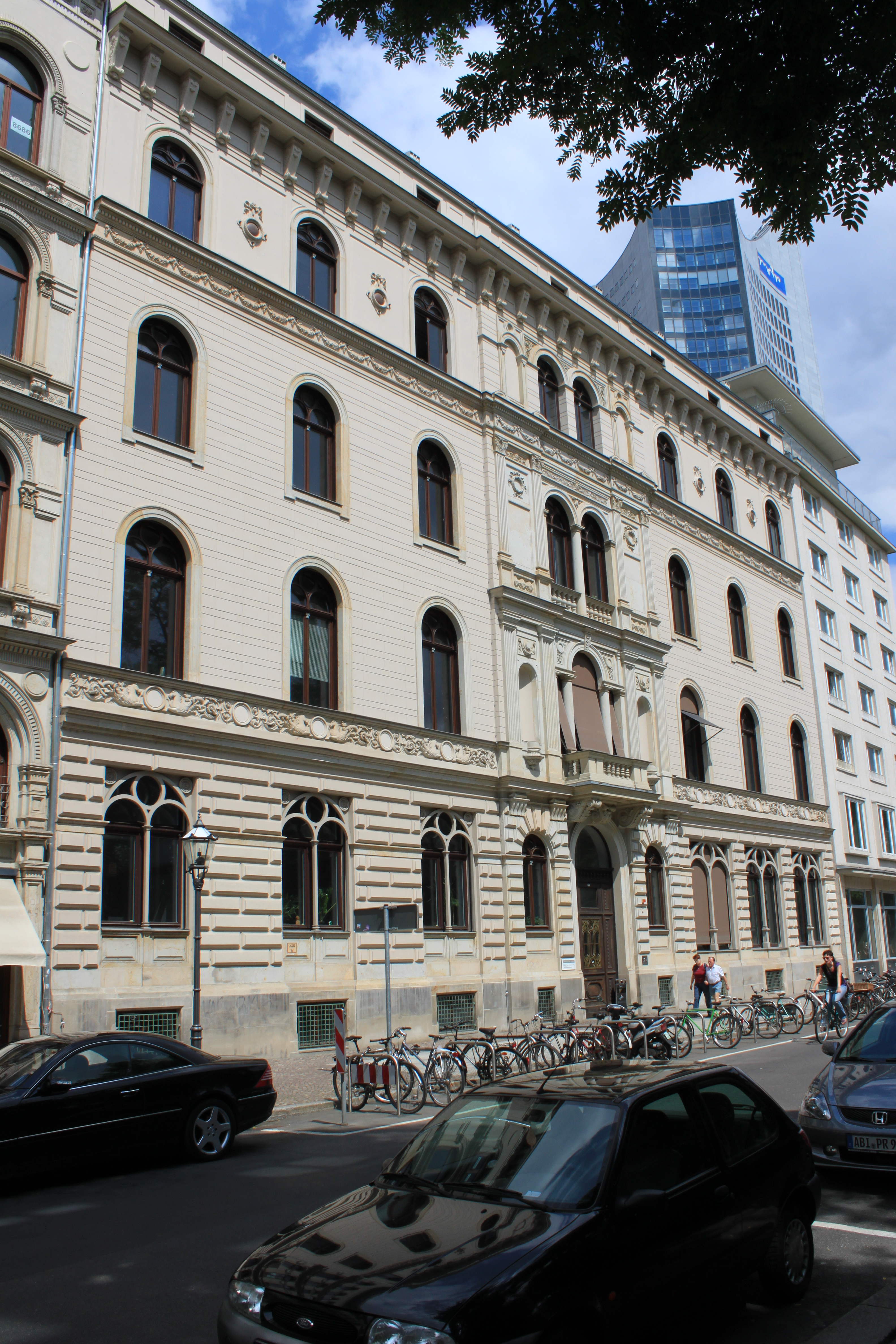 Institut für Ethnologie in der Schillerstraße in Leipzig